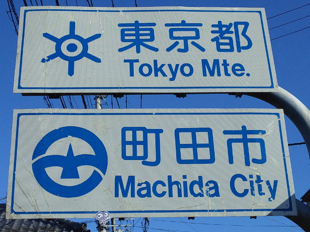 国道16号線に設置されている東京都町田市のカントリーサイン（東京都章が表記されているもの）